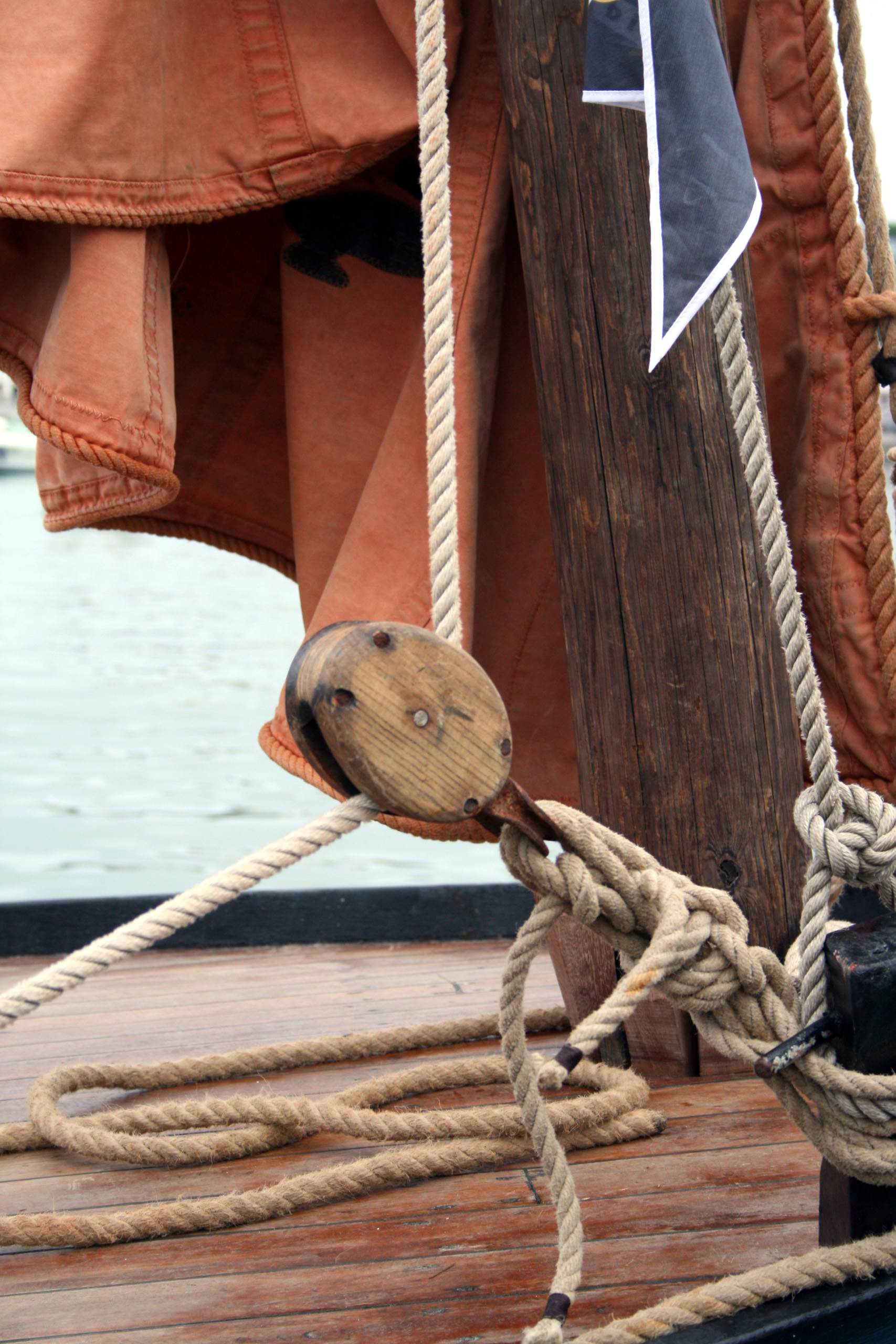 Poulie sur un bateau.